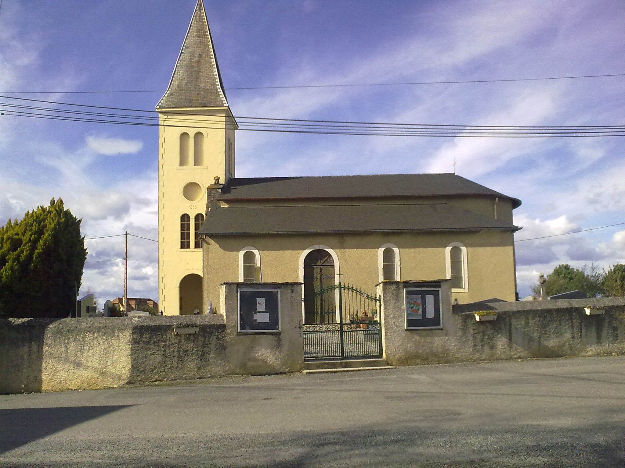 Eglise de Saint-Laurent-Bretagne